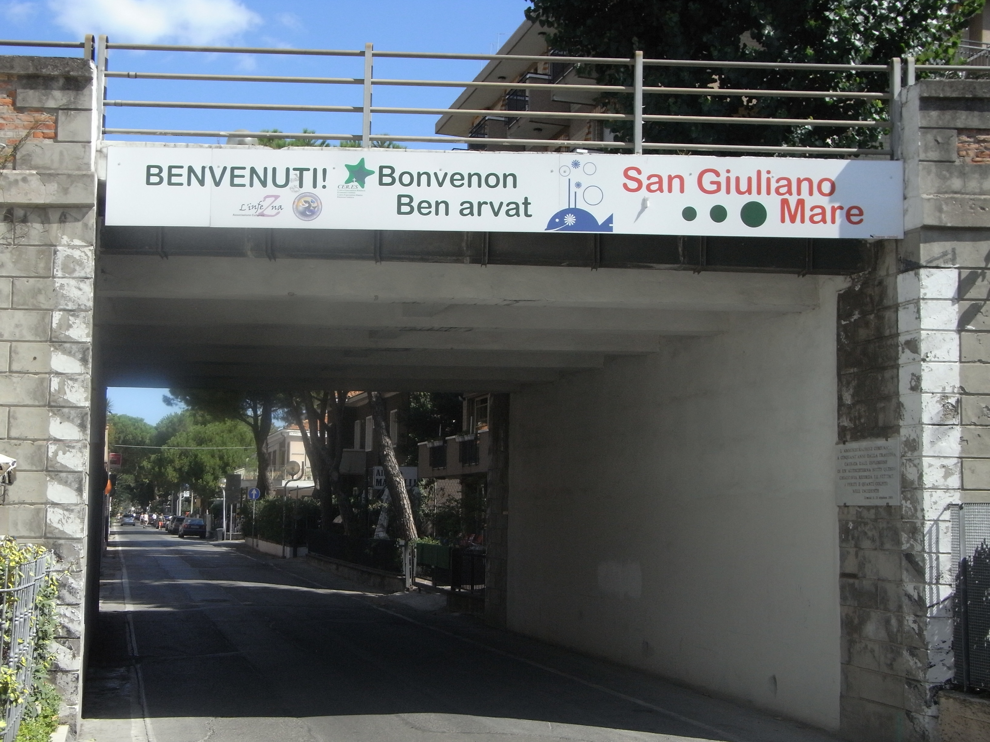 Trilingva bonvenigo (romanja, itala, Esperanto) de kvartalo San Giuliano a Mare (Rimini)